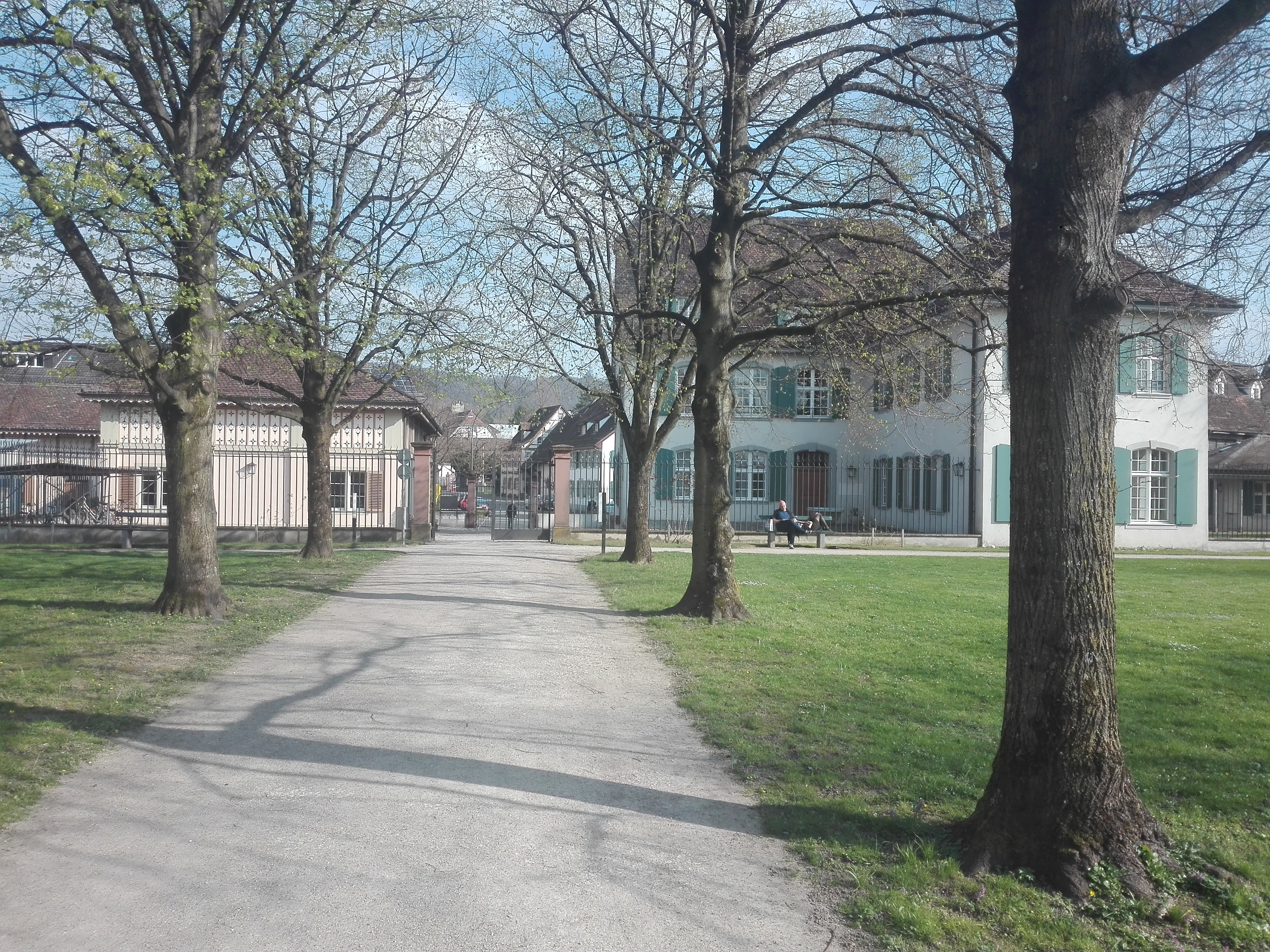 Sarasinpark in Riehen bei Basel (Englischer Garten)